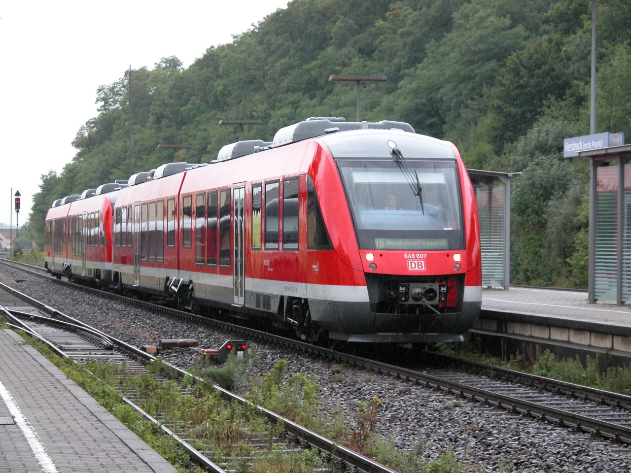 648 807 in Hersbruck r. P.